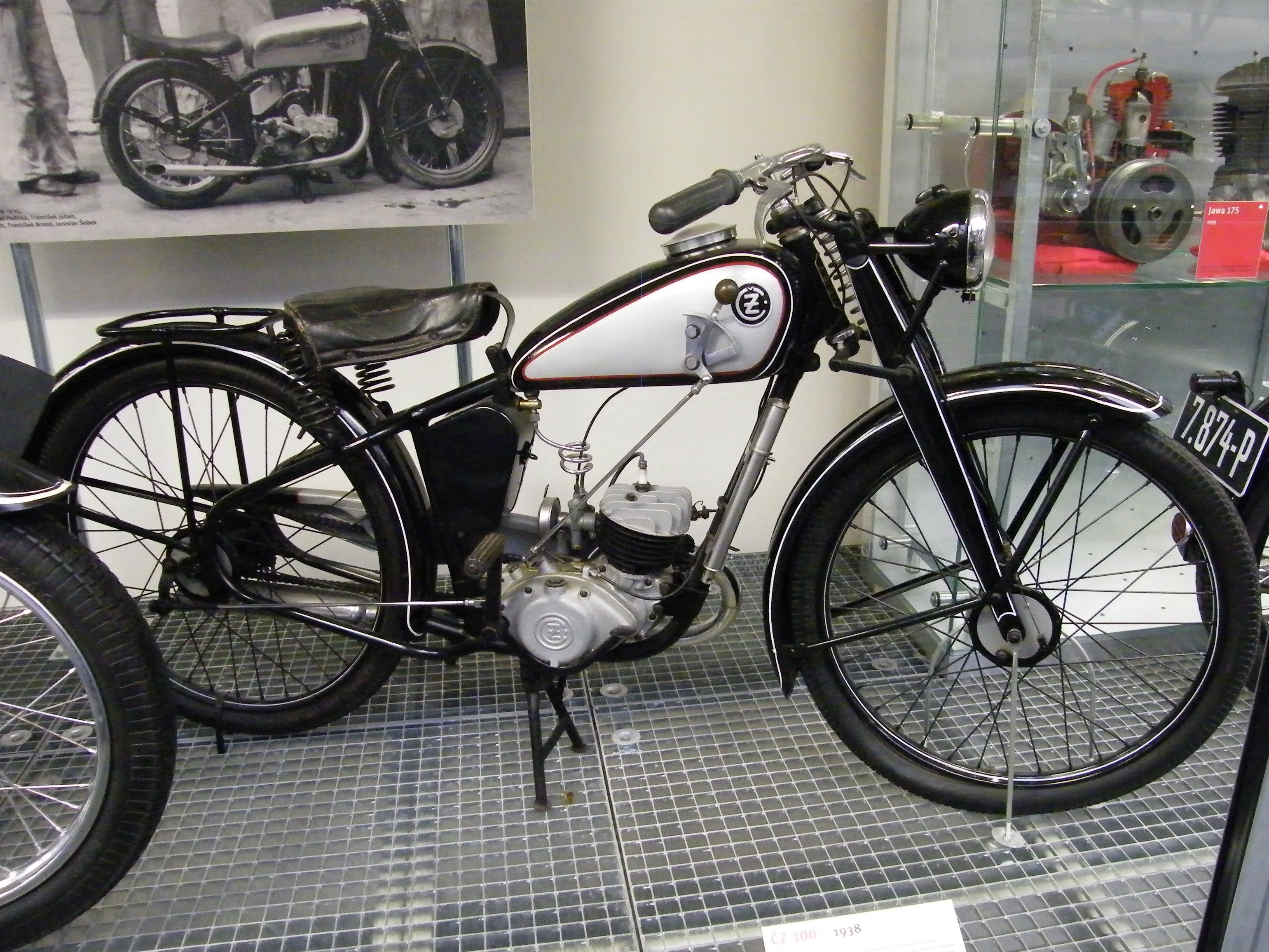 ČZ 98 (1938)